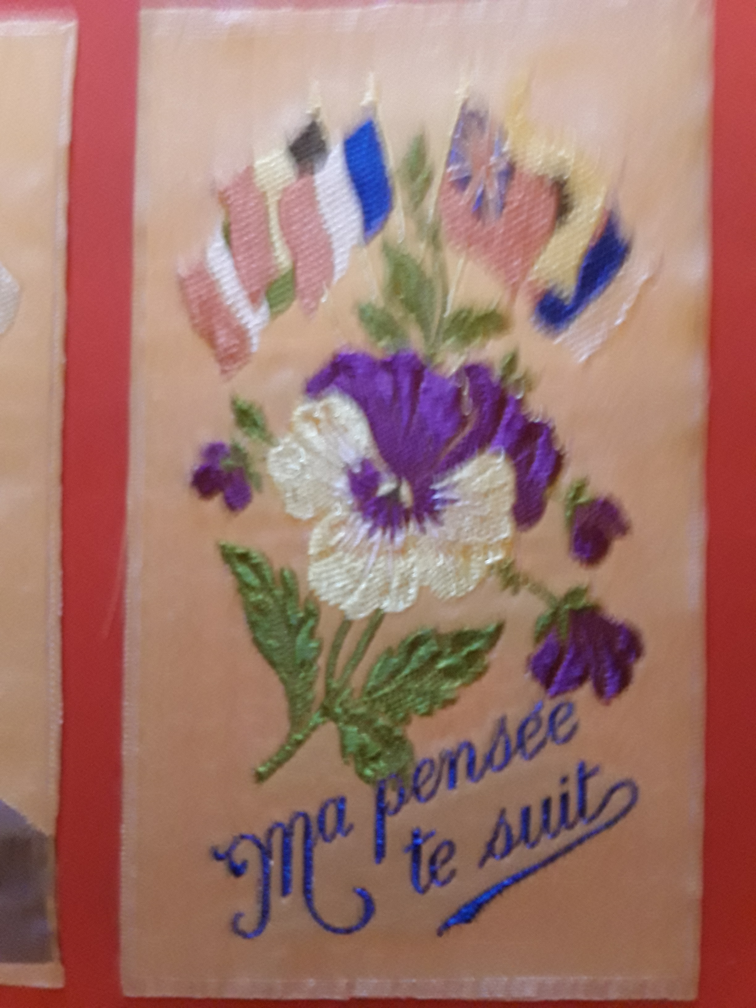 Ruban de soie de Saint-Étienne brodé : "Ma pensée te suit" souvenir de "poilu" de la Première Guerre mondiale, collection particulière.